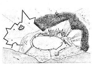 Petrovaradin 1693.